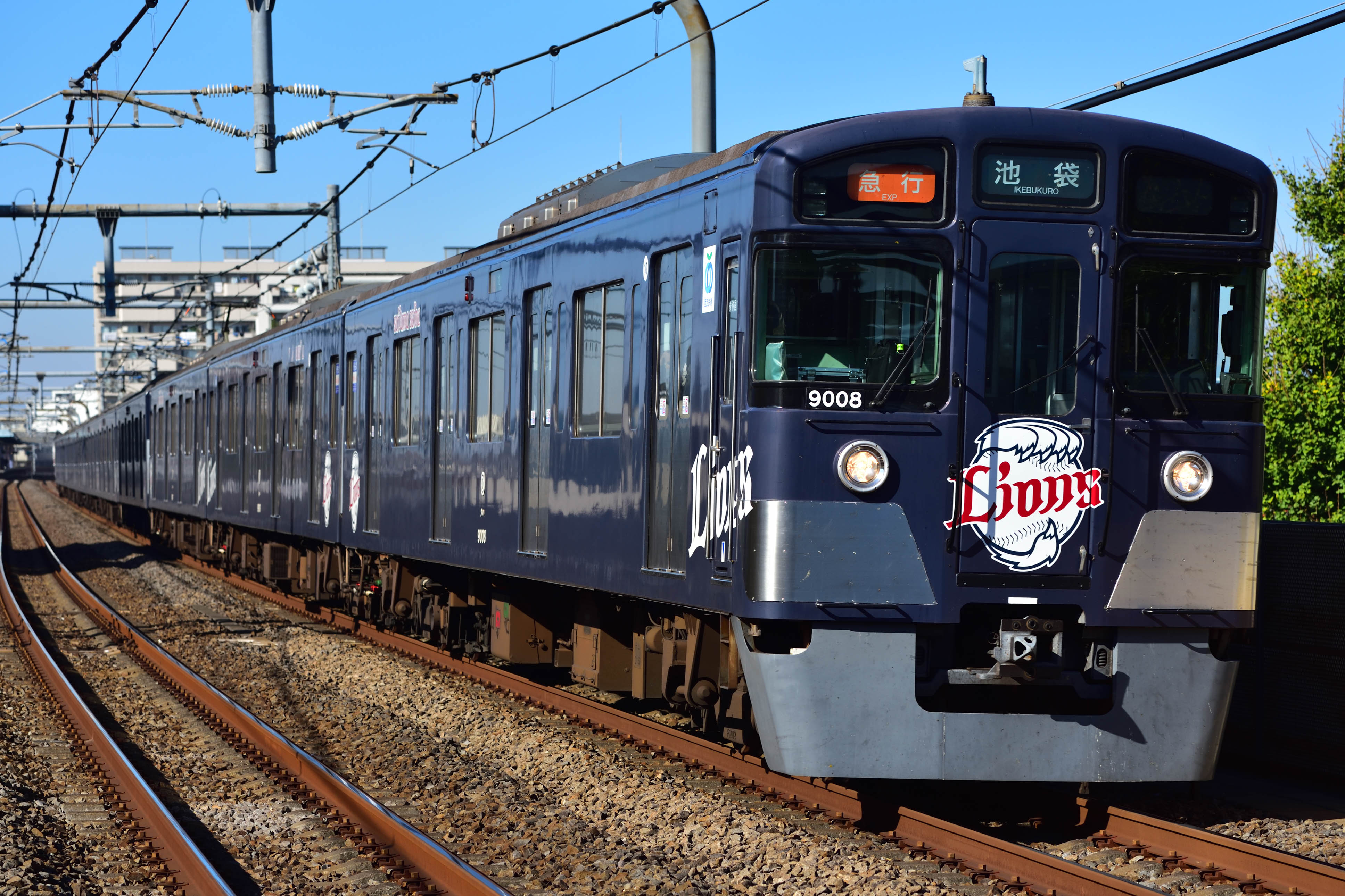 西武池袋線9000系 L-train。中村橋駅。 Nikon D750